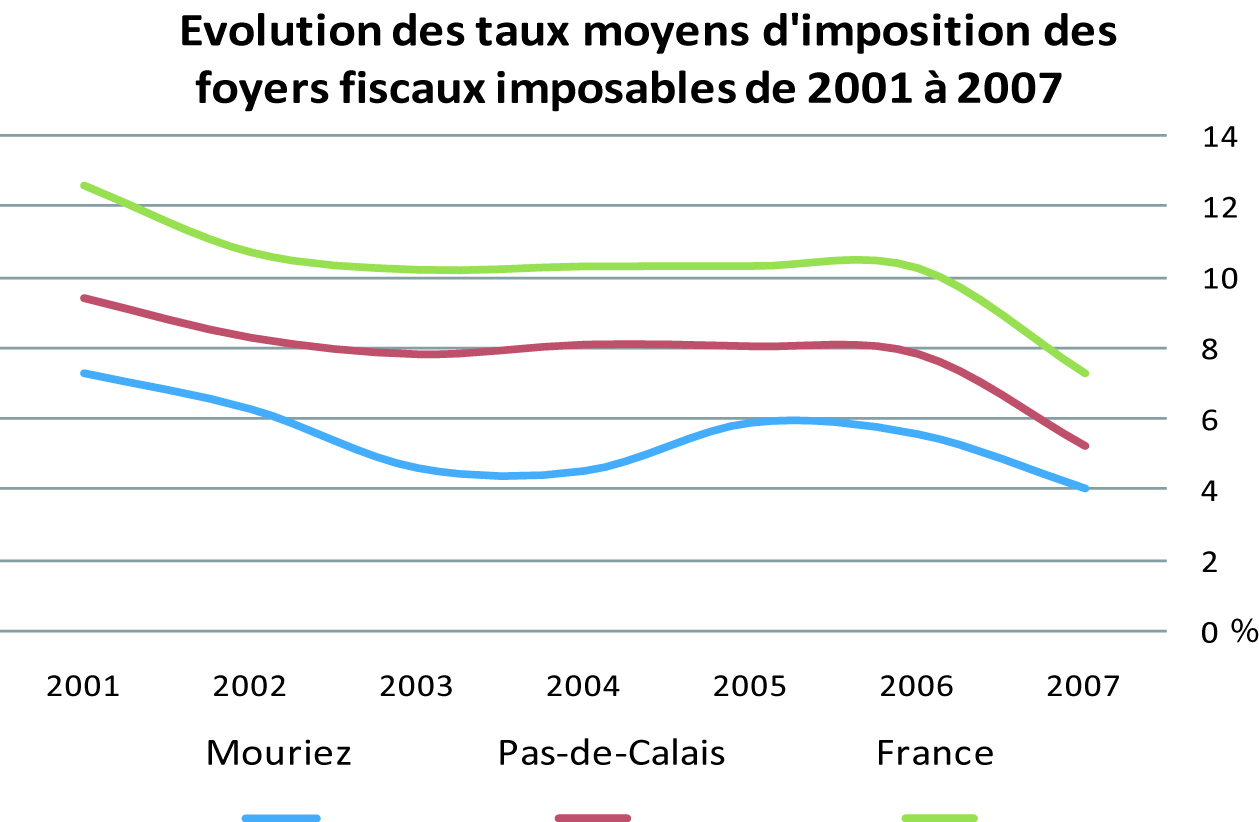 Comparaison entre les évolutions des taux moyens d'imposition des foyers fiscaux imposables de 2001-2007 pour la commune de Mouriez, le département du Pas-de-Calais et la France.